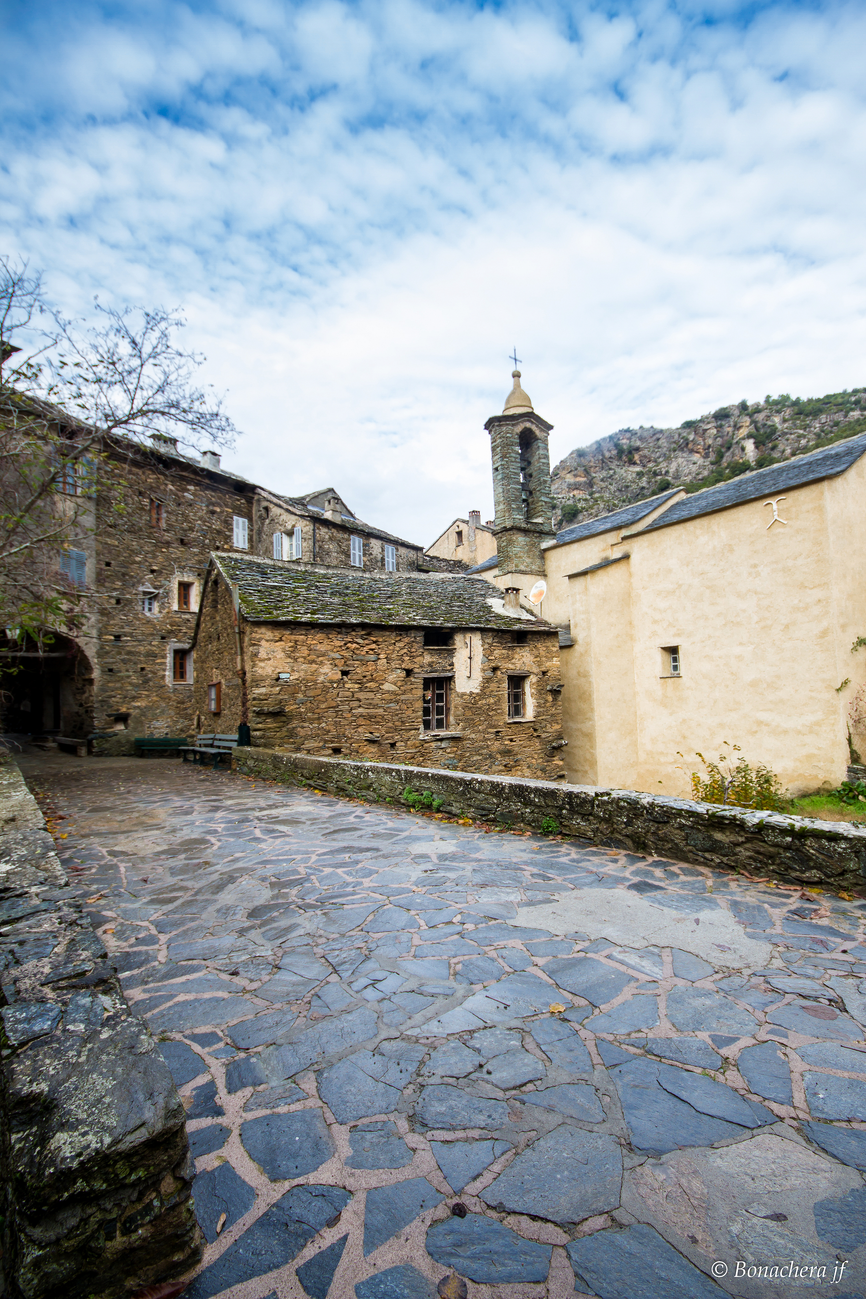 Saliceto, Castagniccia (Corse) - Entrée du village